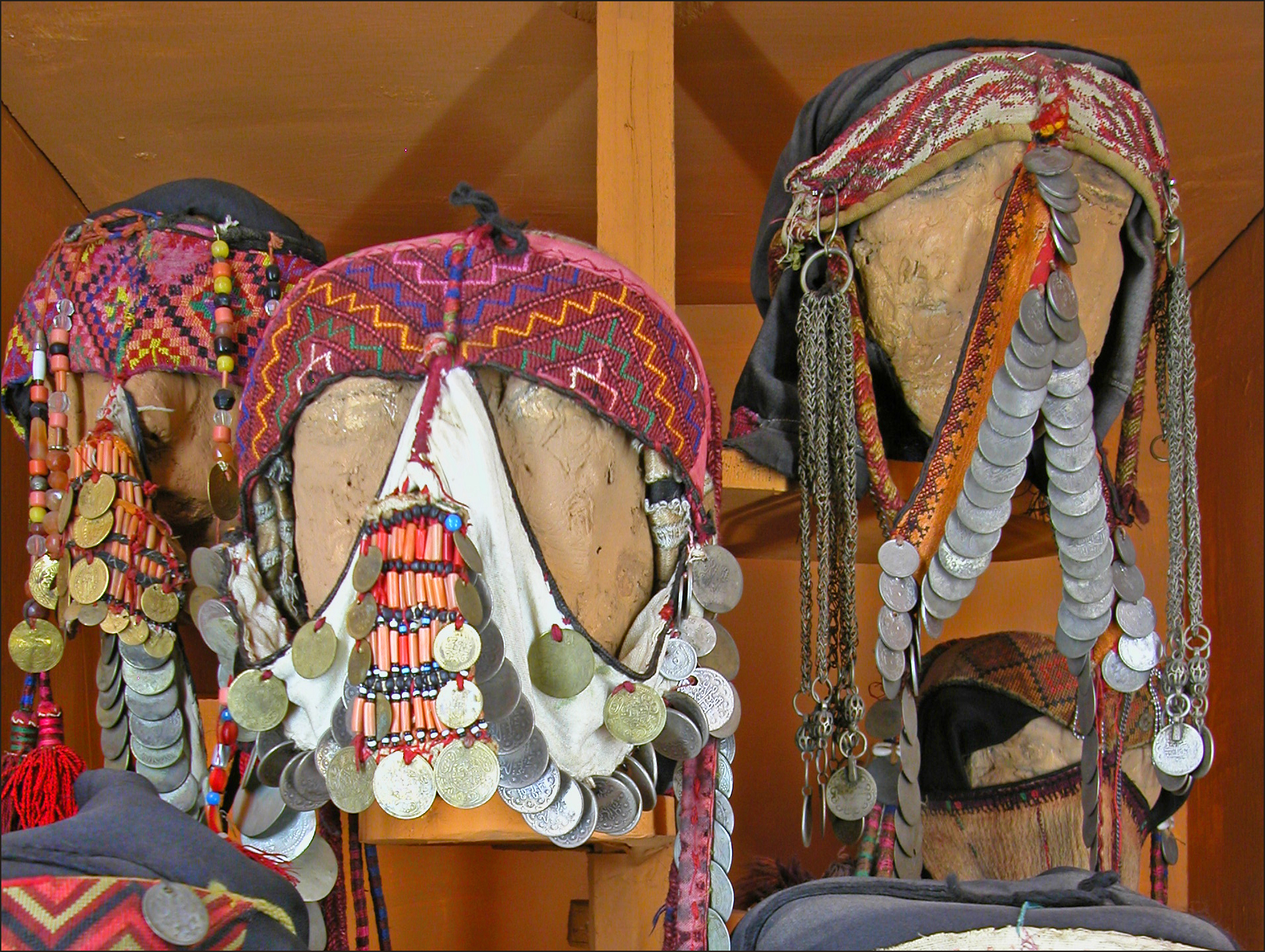 Coiffes avec "burgo" du sud de la Palestine Le burgo est un masque qui cache certaines parties du visage des femmes bédouines. C'est une variante du voile. Le Musée des arts et traditions populaires de Jordanie a été ouvert en 1971. Il est situé à l'est du théâtre romain à Amman et a pour ambition de rassembler le patrimoine jordanien et palestinien de toute la Jordanie afin de le protéger et de conserver pour les générations futures. Il est en outre chargé de faire connaître cet héritage populaire au monde entier. Le musée comprend cinq salles d'exposition. -La première est consacrée aux costumes traditionnels de la Transjordanie. -La seconde aux bijoux et produits de beauté traditionnels des diverses régions de la Transjordanie et de la Cisjordanie. -La troisième présente une collection de robes et de costumes palestiniens. -Dans la quatrième sont exposés une collection de poteries et de récipients en bois pour la cuisine ainsi que des bijoux en argent et des robes de mariées provenant de la Cisjordanie. -La cinquième, située dans une chambre forte du théâtre romain, abrite une collection de mosaïques des églises byzantines à Jérash et Madaba. extrait du site officiel